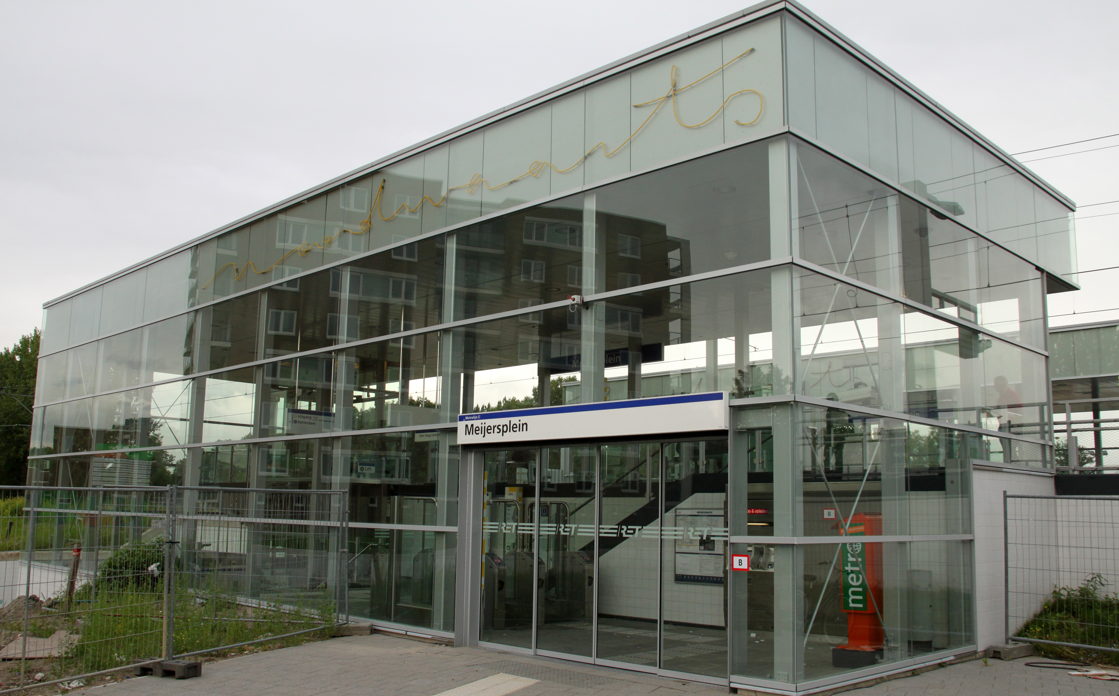 Metrostation Meijersplein van RandstadRail.